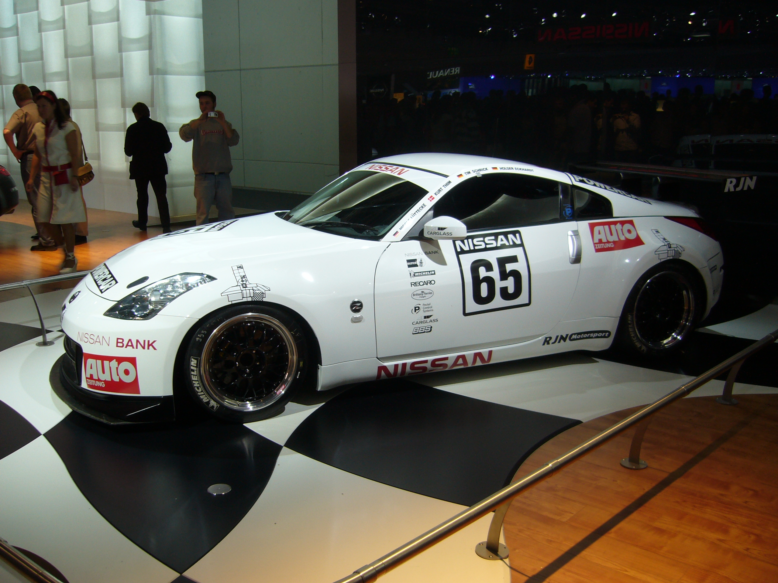 Nissan 350Z GT4